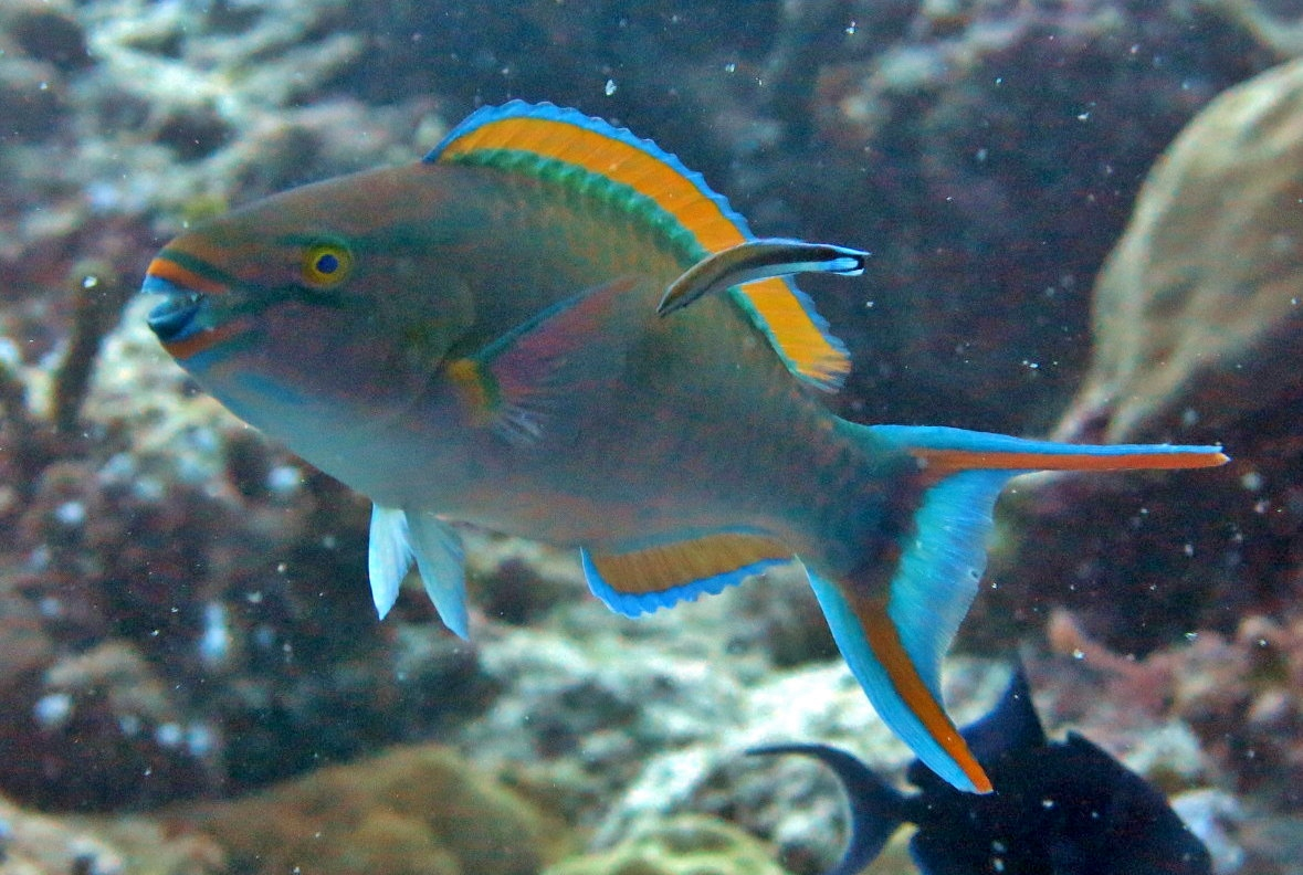 Un poisson-perroquet tricolore (Scarus tricolor) aux Maldives (atoll de Baa).